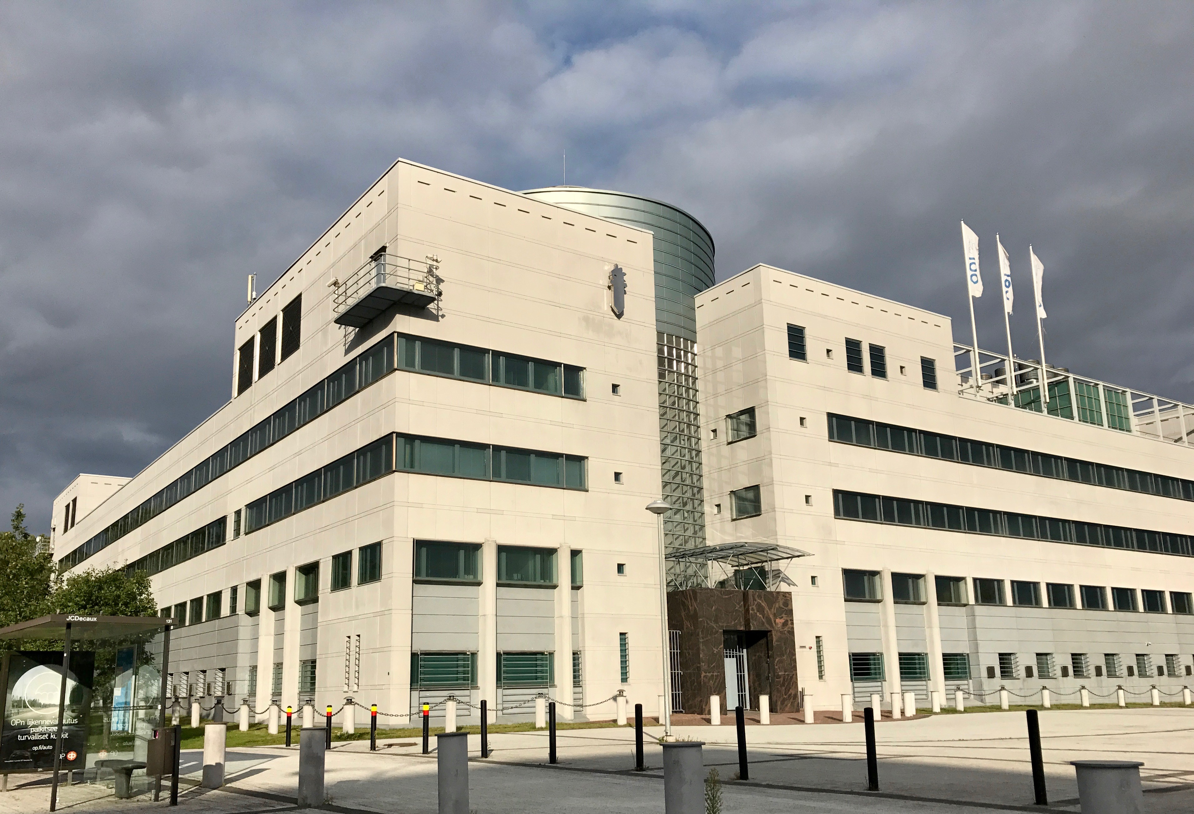 Keskusrikospoliisin keskuspaikka Vantaalla